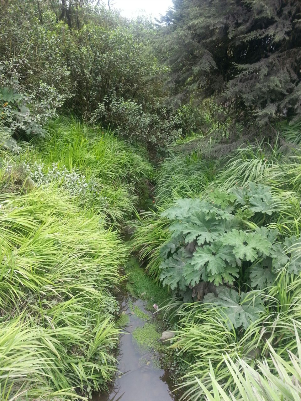 Hoja de pantano, madre de agua (Gunnera schultesii) Páramo de Guasca, Cundinamarca, Colombia.